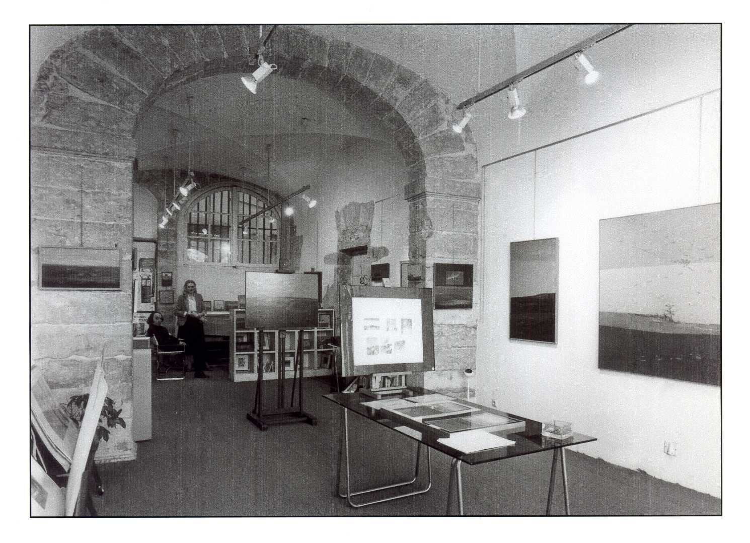 Galerie de Colette et Roger Kowalski, 25 quai de Bondy, Lyon (photo non datée, années 1970).